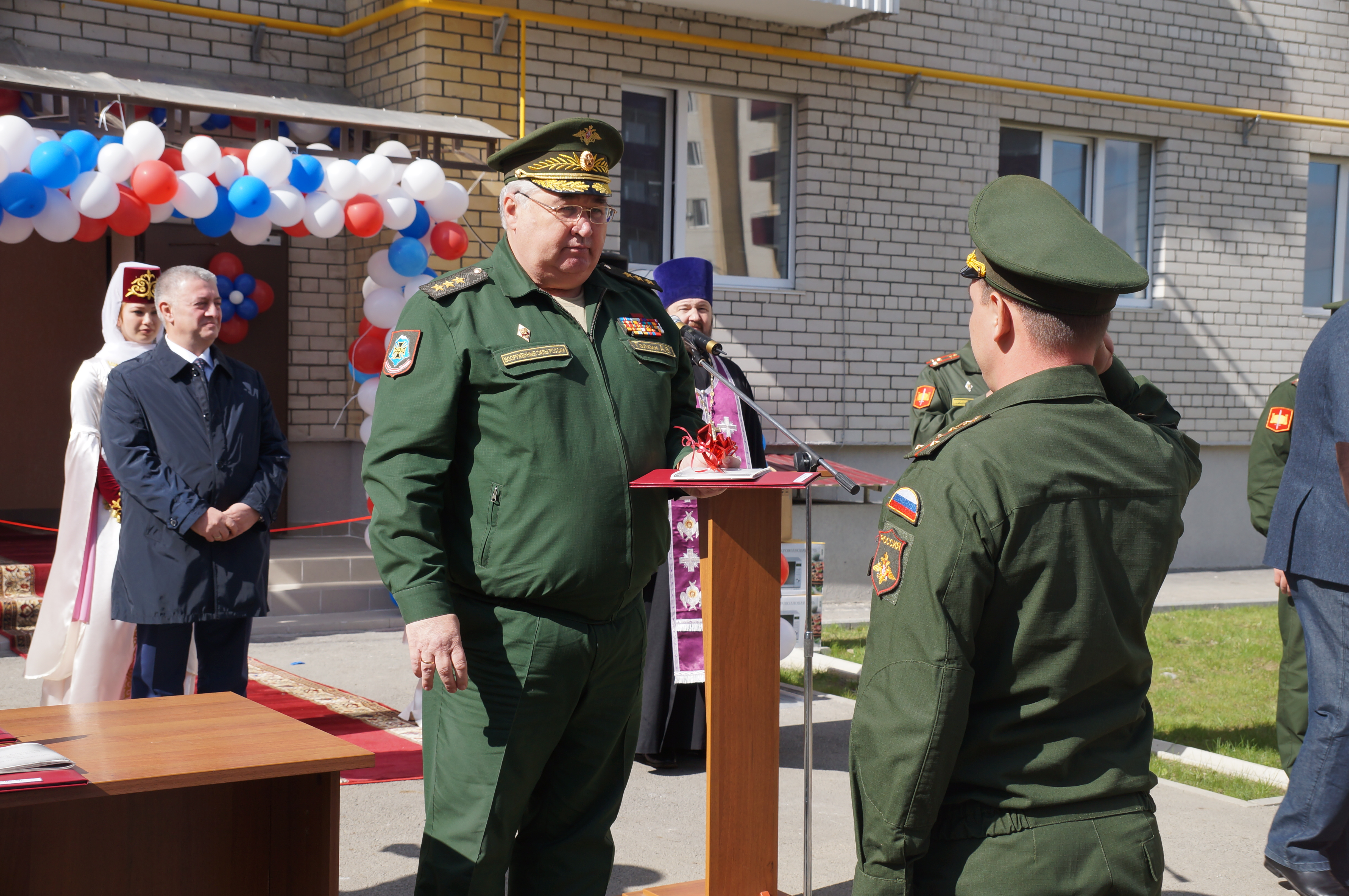 Командующий ЮВО, вручает ключи от квартир в новом городке офицерам, Владикавказ 2014 год